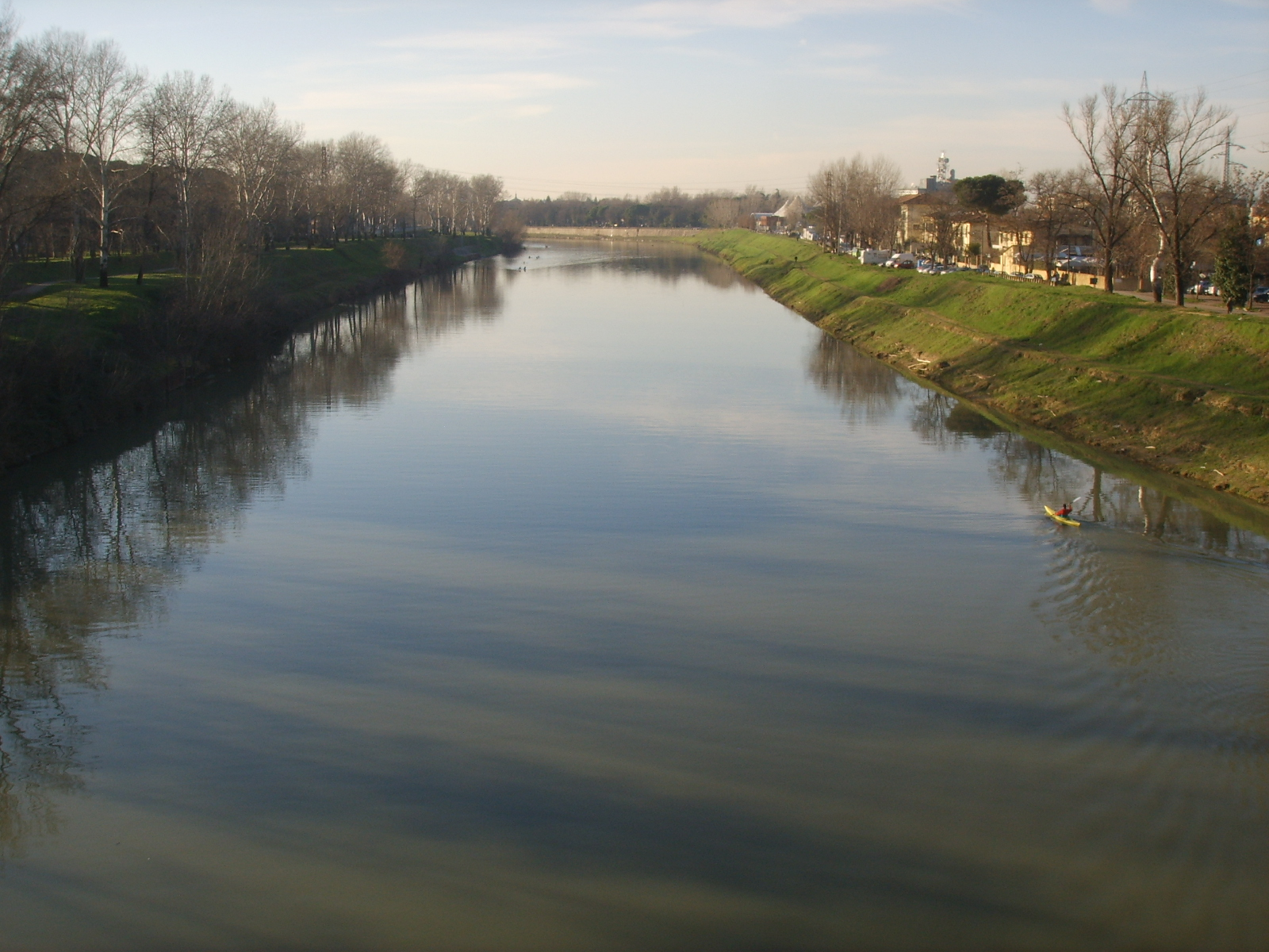 Arno presso varlungo